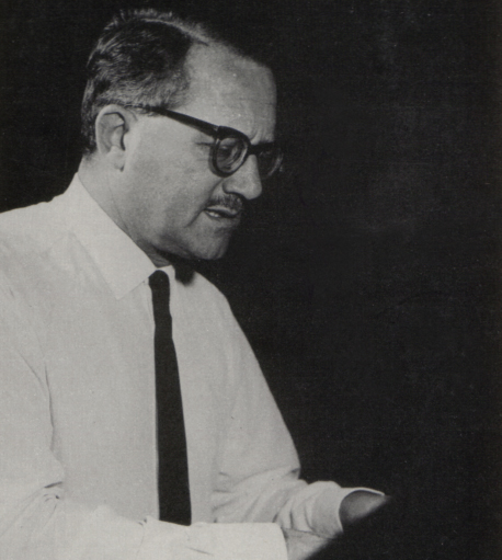 Photographie du pianiste et conférencier Michel Briguet